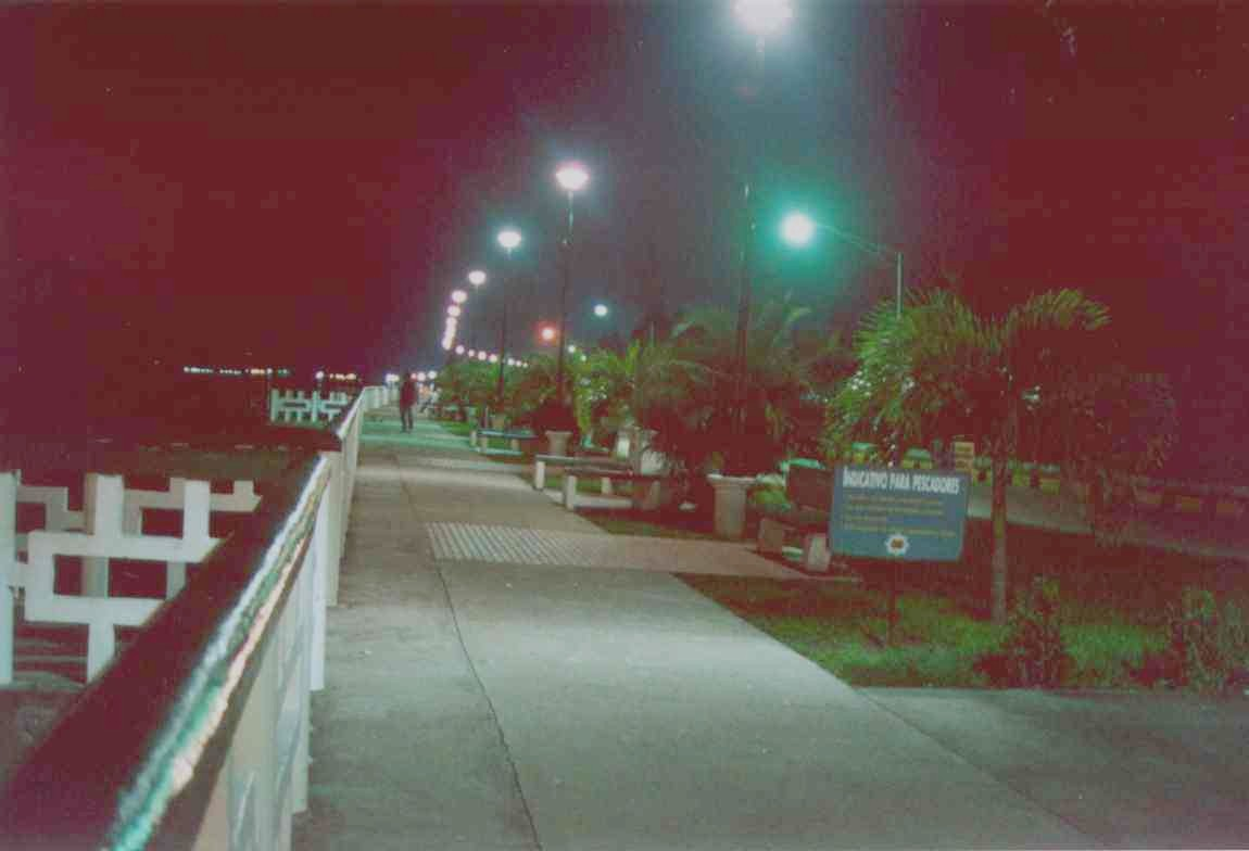 El Malecón in Puerto Cortés, Honduras